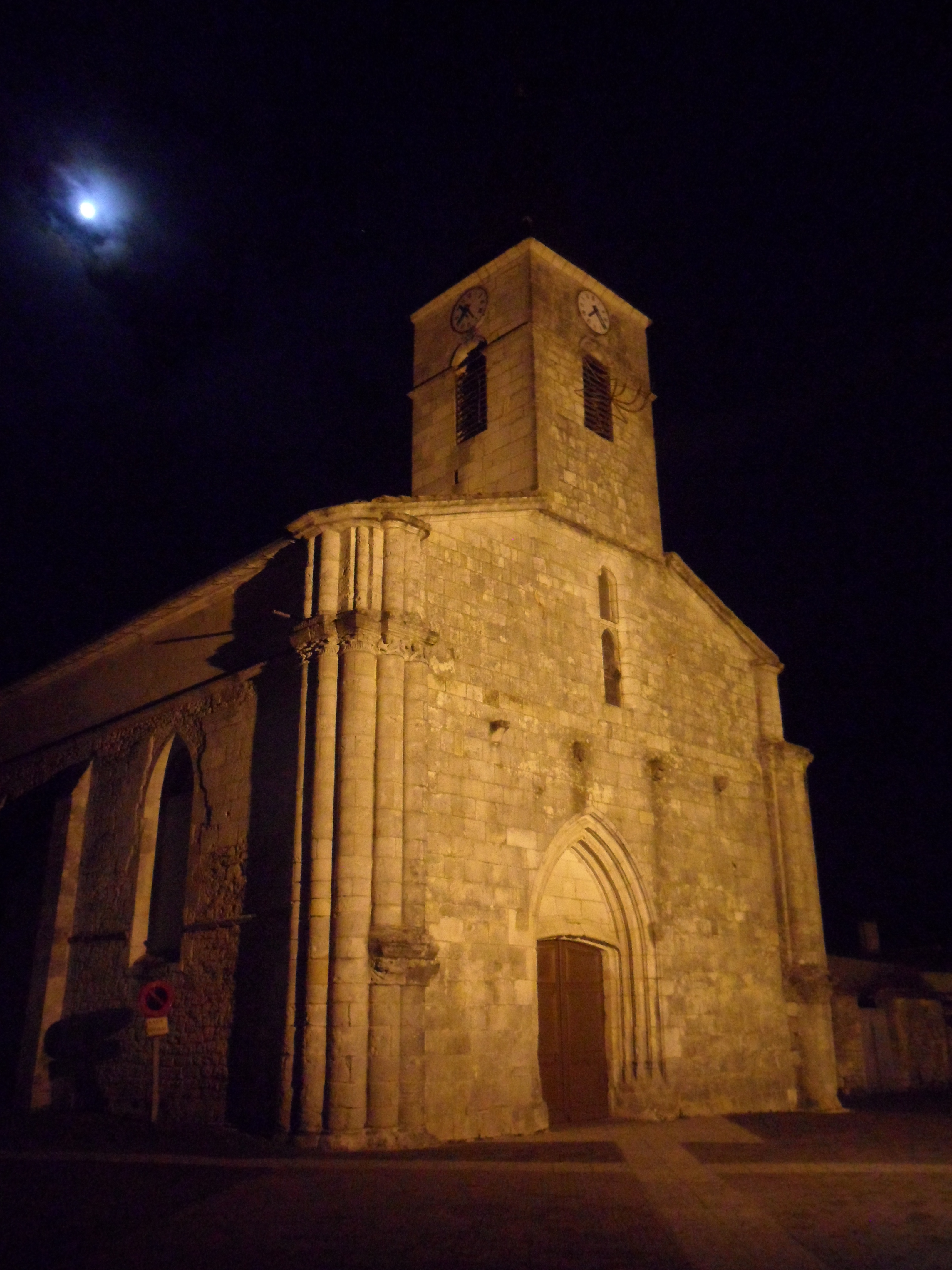 l'église d'arvert la nuit